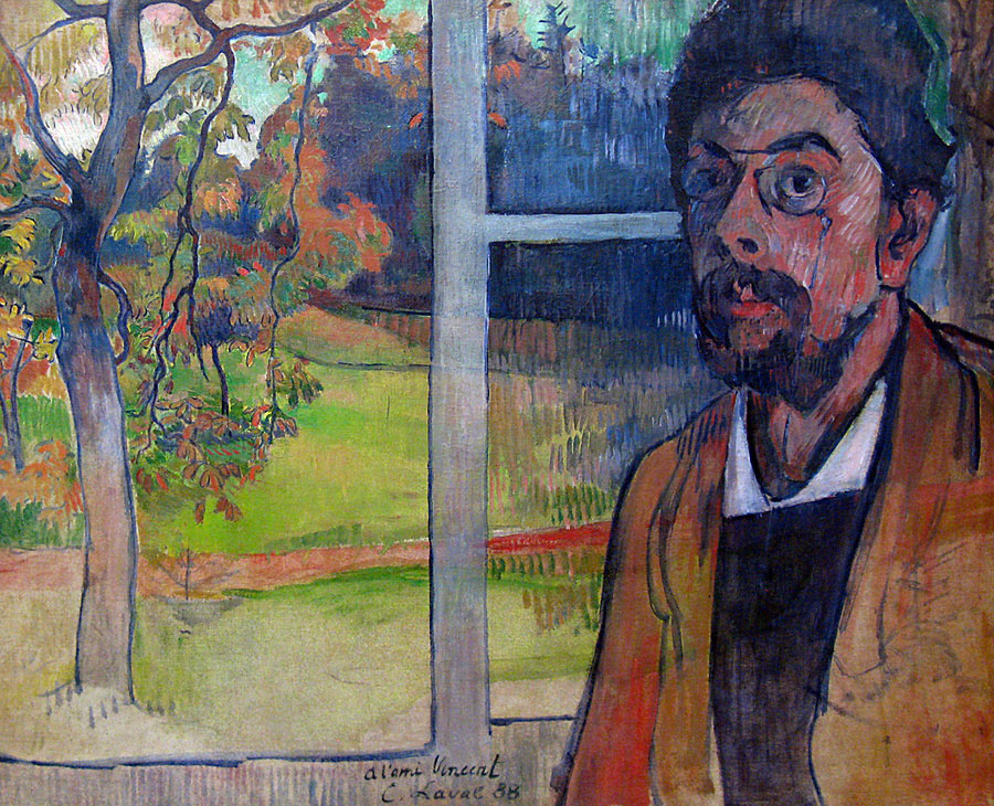 ~Zelfportret